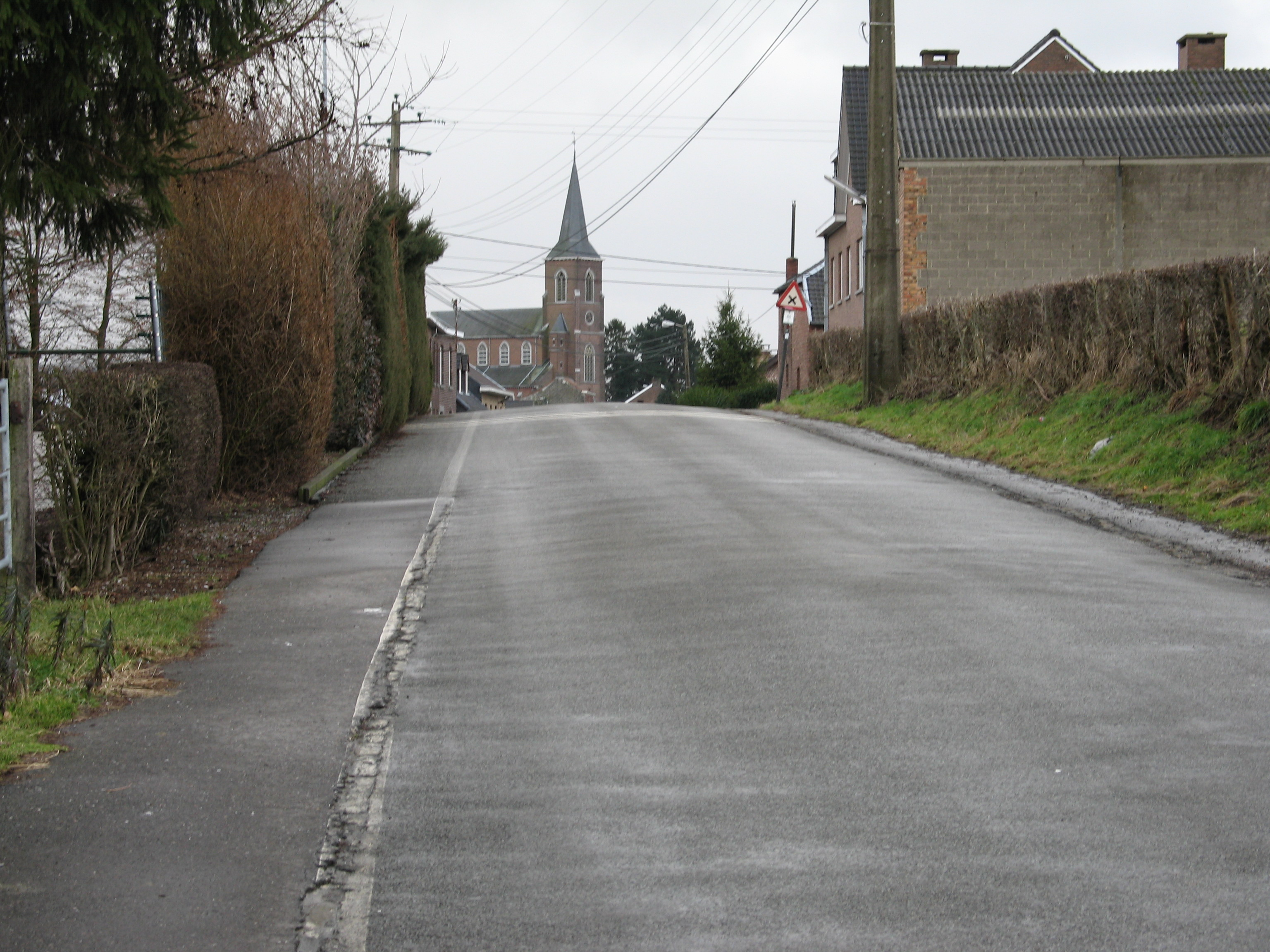 Teuven (Nurop), dorpsgezicht